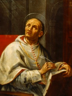 San Pedro Damiani, Biblioteca Classense, Ravenna - Italia